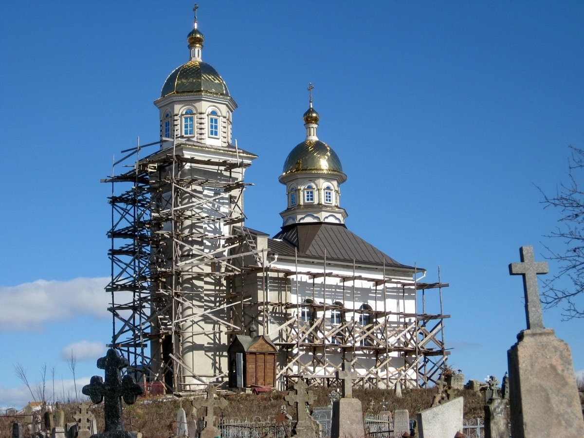 Валожын. Рэканструкцыя капліцы